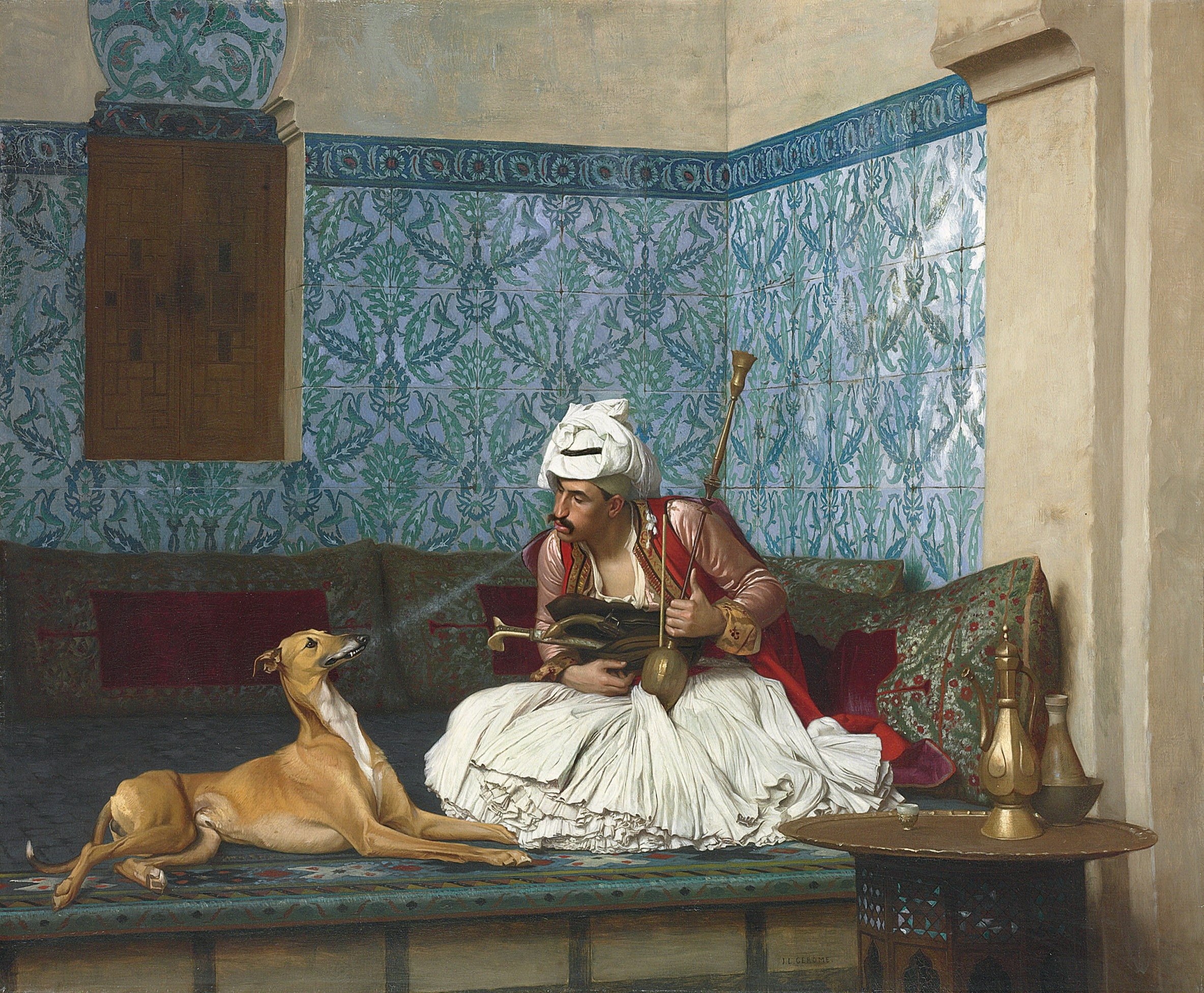 Orientalisme. Peinture de Jean-Léon Gérôme intitulée "Une Plaisanterie" datant de 1882. On y voit un Musulman fumant le Narguilé dans son salon et soufflant une bouffée à son chien un lévrier arabe, appelé également Sloughi.